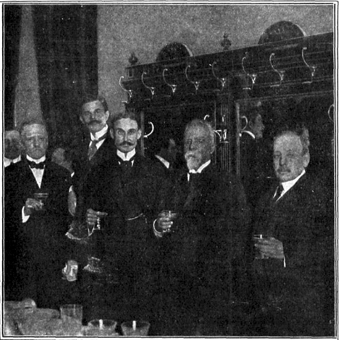 El Intendente de Buenos Aires Joaquin de Anchorena (izquierda, de bigote negro) brinda con Manuel de Campos Sales (de barba blanca) en el Concejo Deliberante de Buenos Aires, durante una visita.